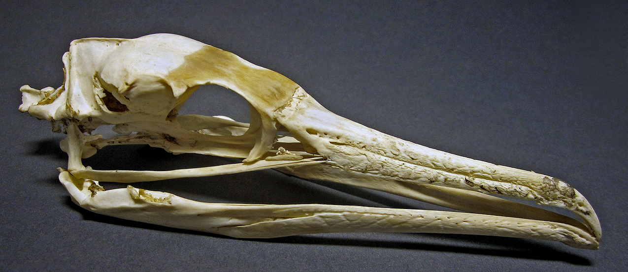 Storskarv - Kranium - Phalacrocorax carbo.